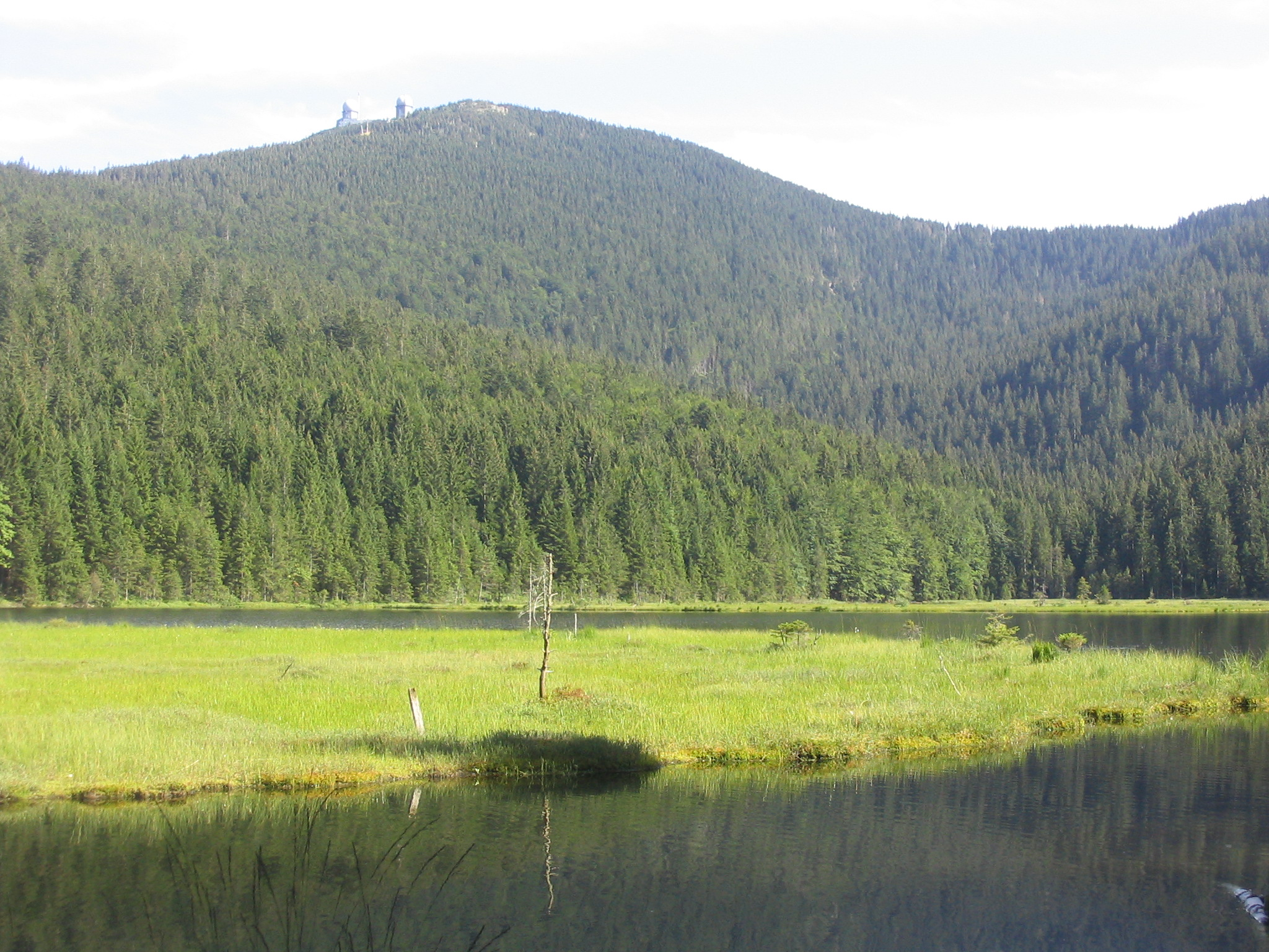 Blick über den kleinen Arbersee zum Großen Arber, aufgenommen am 23.07.2007 von Dr. Hagen Graebner